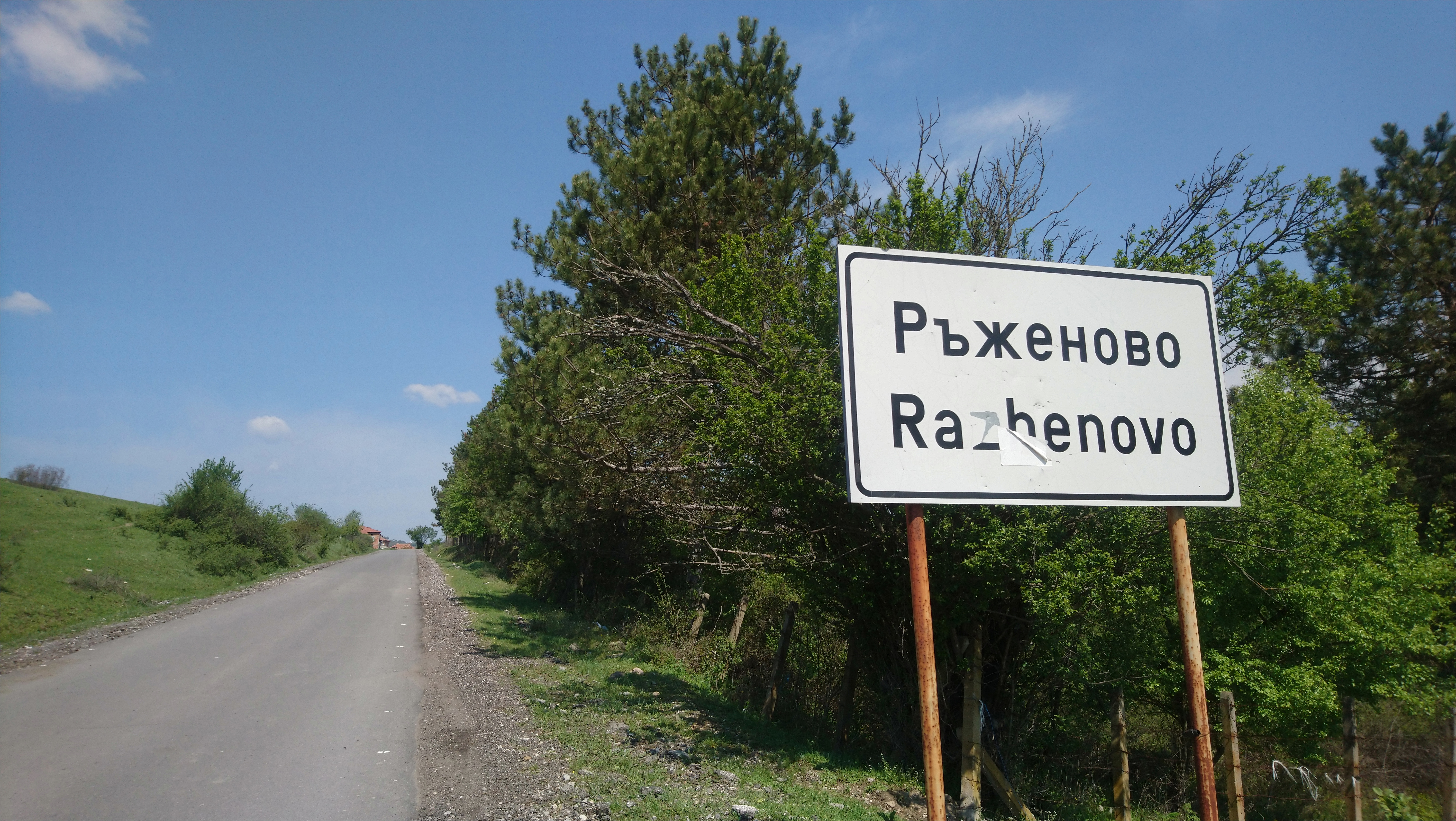 Табелата на входа на село Ръженово